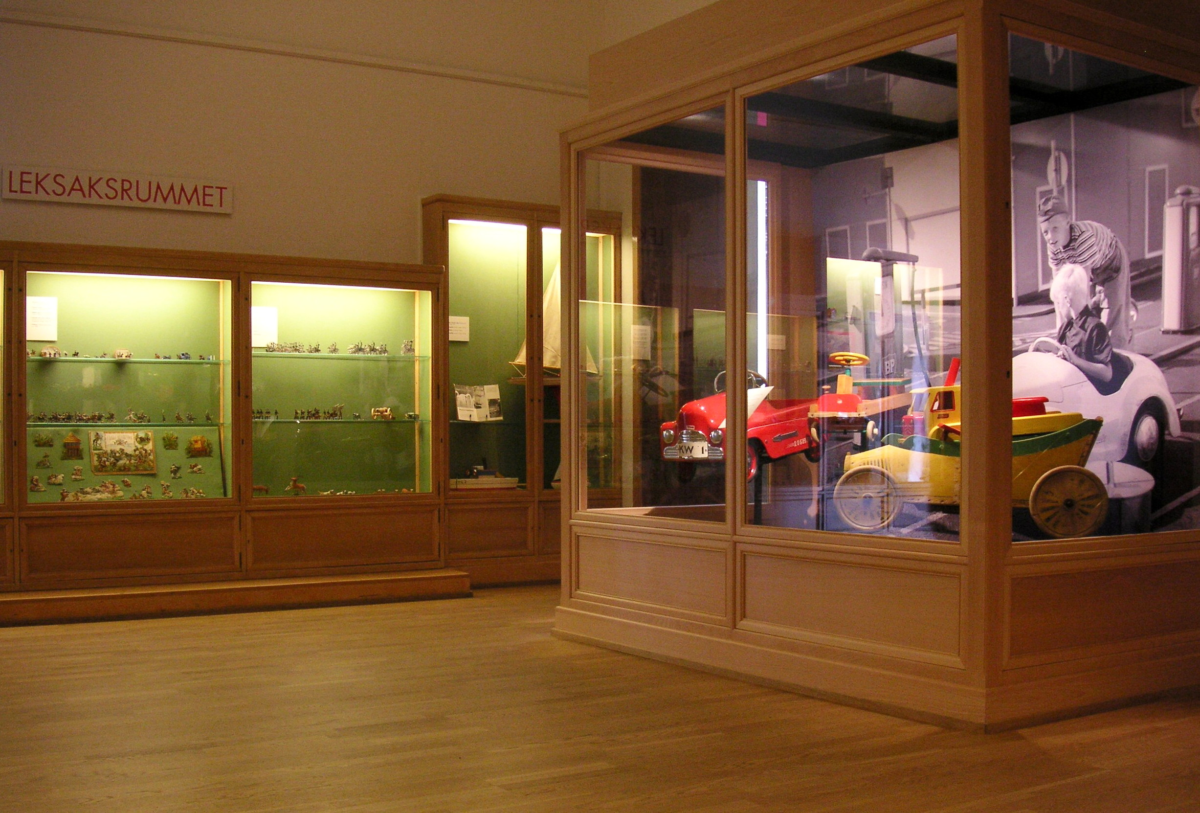 Nordiska museet leksaksrummet